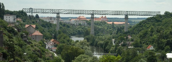 Eisenbahnbrücke über die Thaya in Znaim an der Thaya, dahinter Kloster Bruck